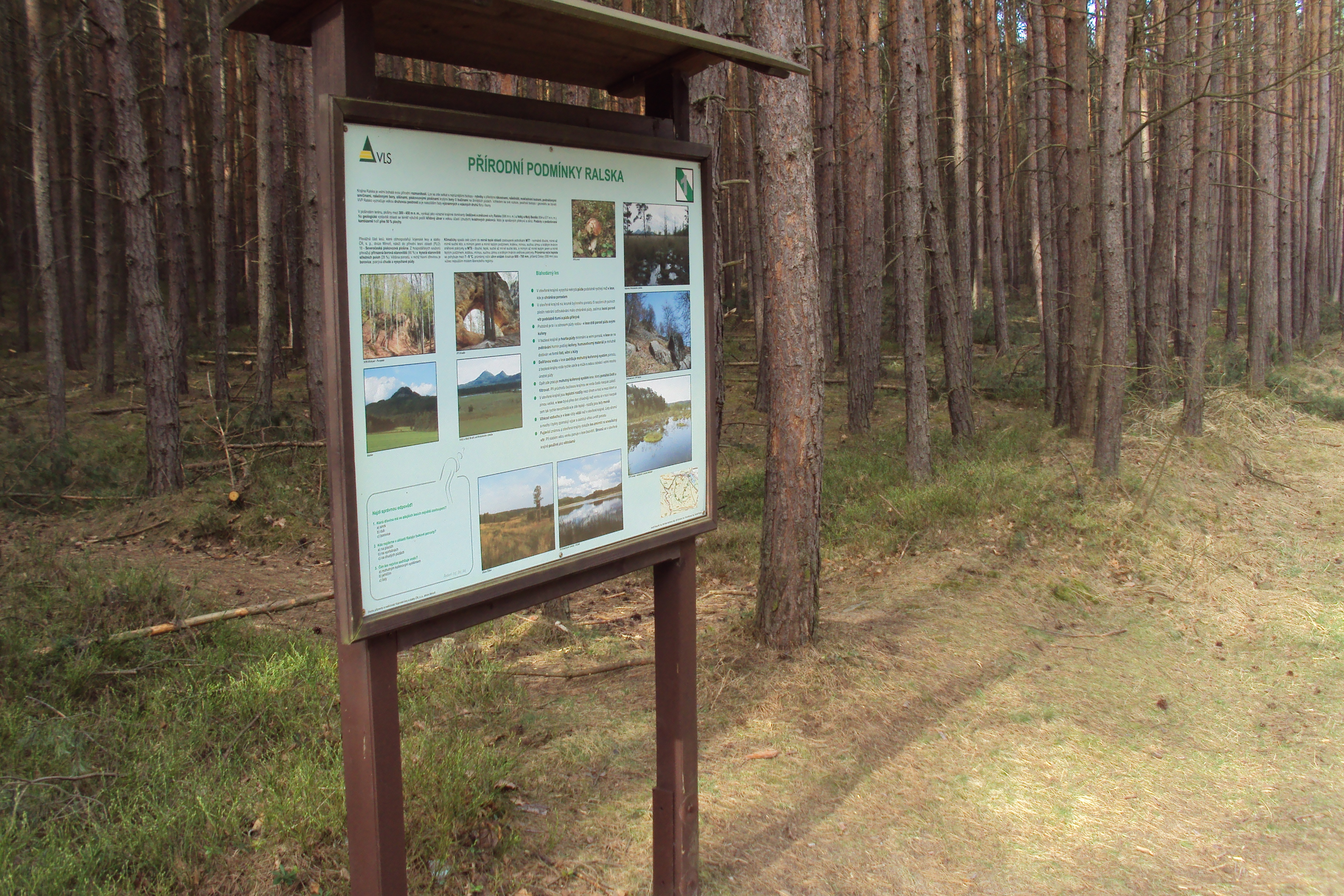 Naučná stezka Vojenských lesů, okraj obce Hradčany